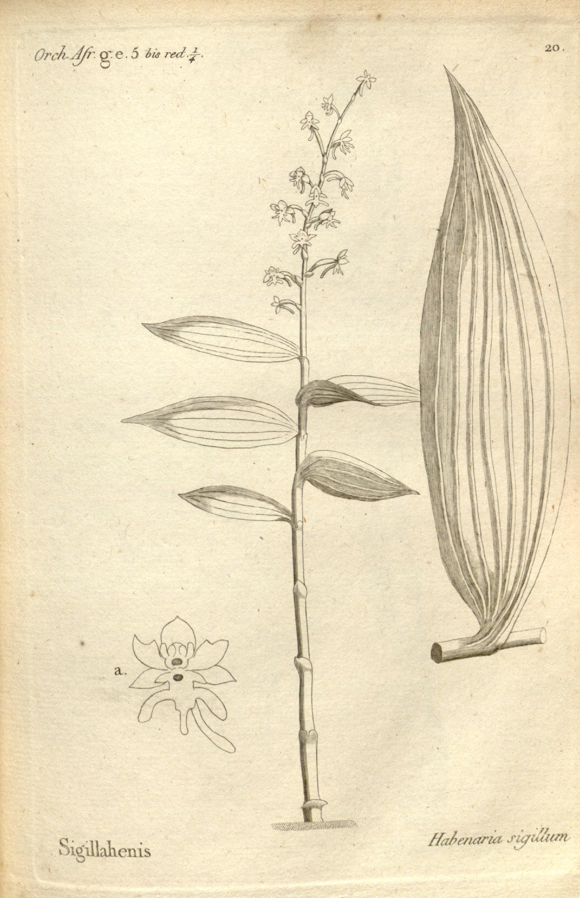 Histoire particulière des plantes Orchidées recueillies sur les trois îles australes d'Afrique, de France, de Bourbon et de Madagascar /par Aubert-Aubert Du Petit-Thouars ...